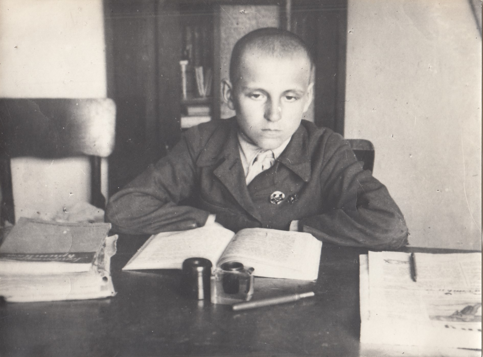 Октябрёнок Желтуха Анатолий Петрович